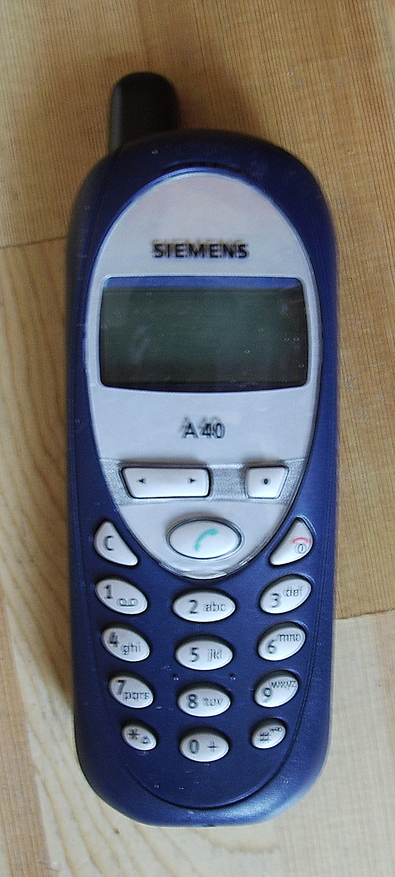 Telefon Siemens A40 firmy Siemens.